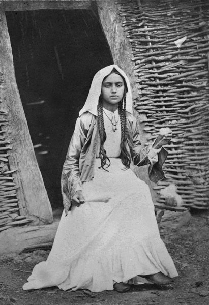 აფხაზი გოგონა, ფოტოგრაფი ბარკანოვი, 1881